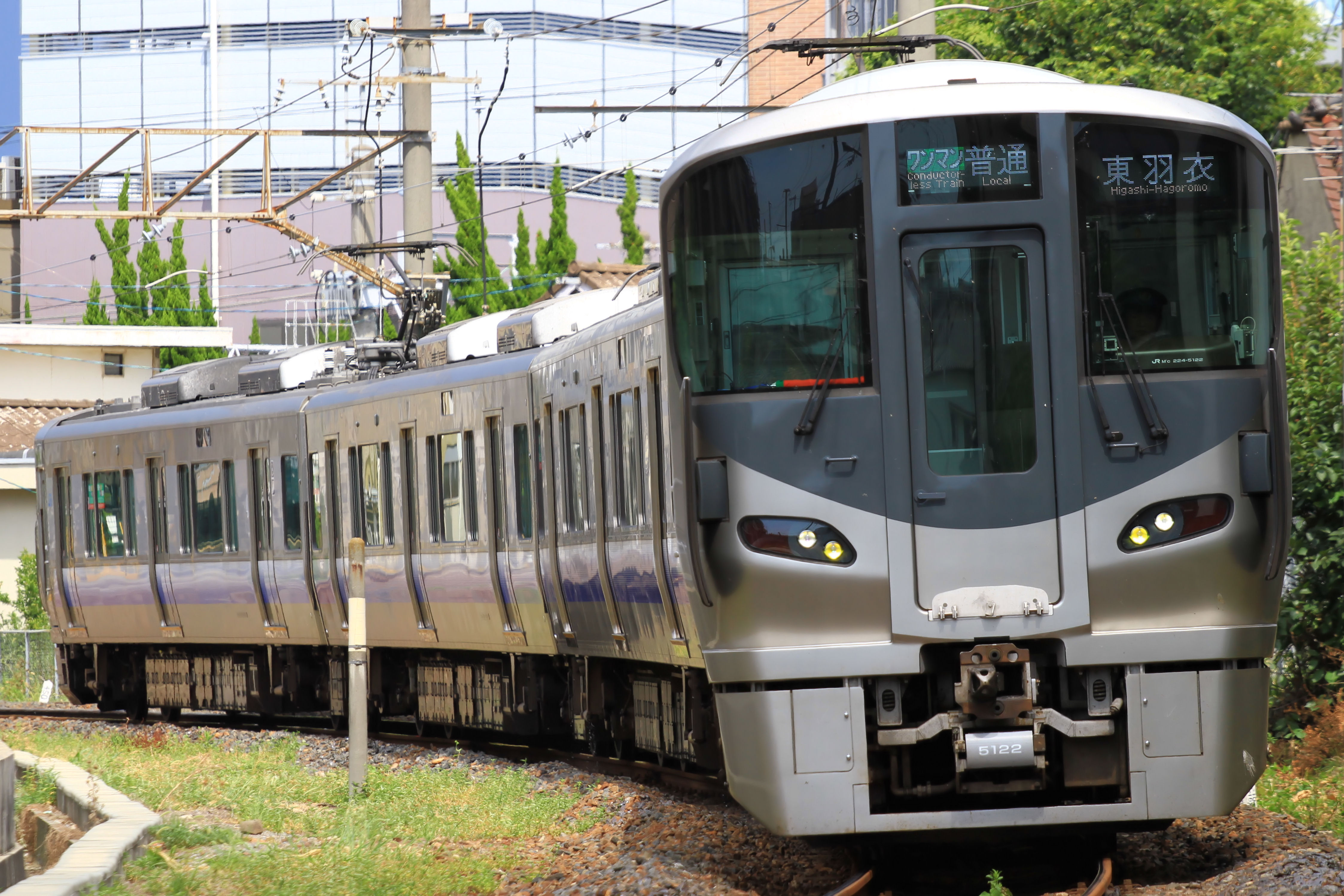 JR西日本 羽衣線225系ワンマン車 Canon EOS 7D